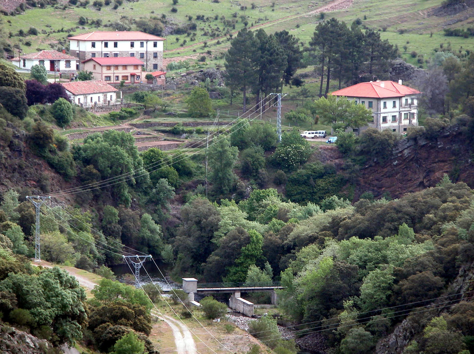 Tabladas, aldea de Mansilla de la Sierra, La Rioja - España.